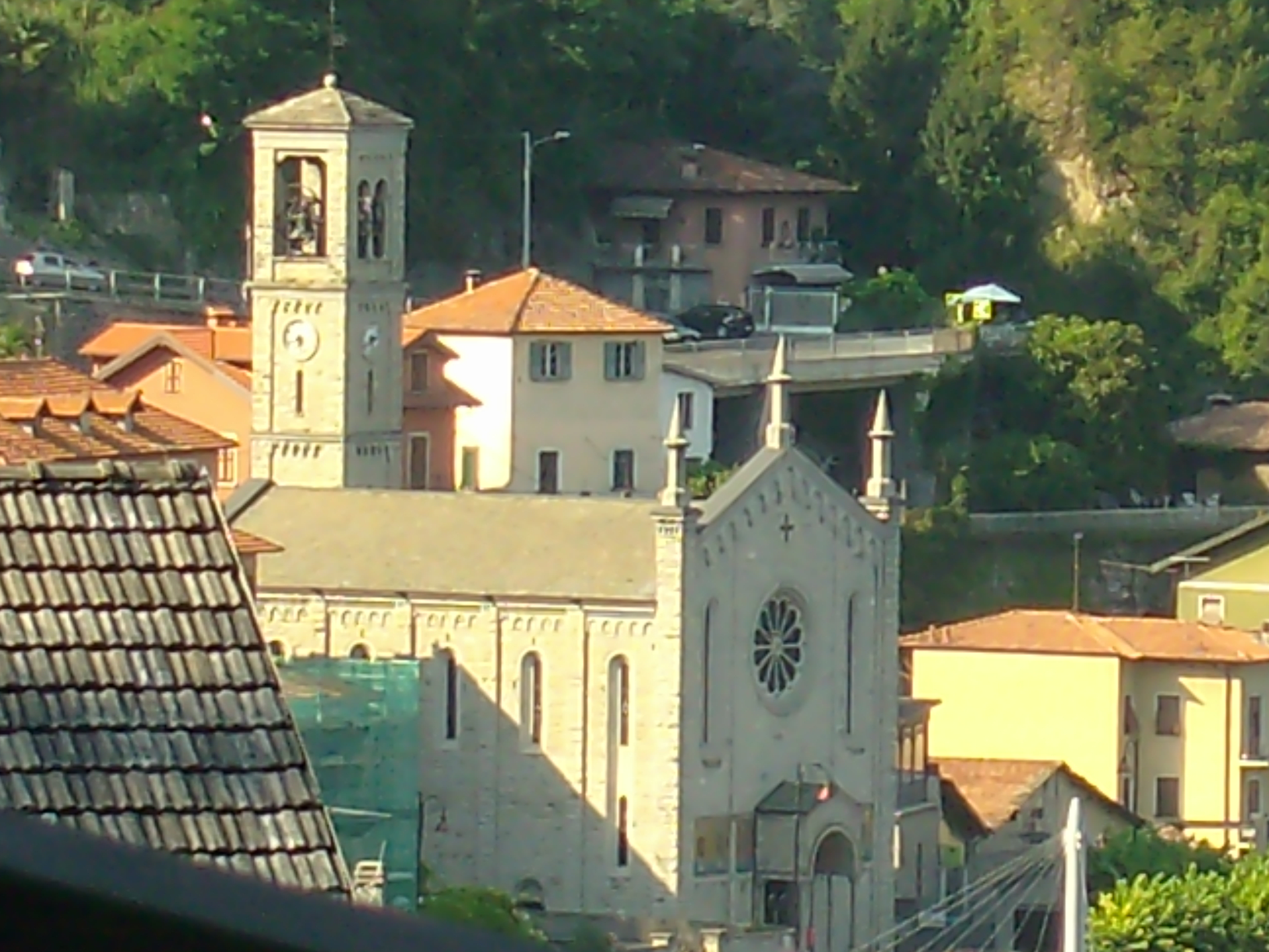 Argegno - Chiesa Parrocchiale della S.S. Trinità